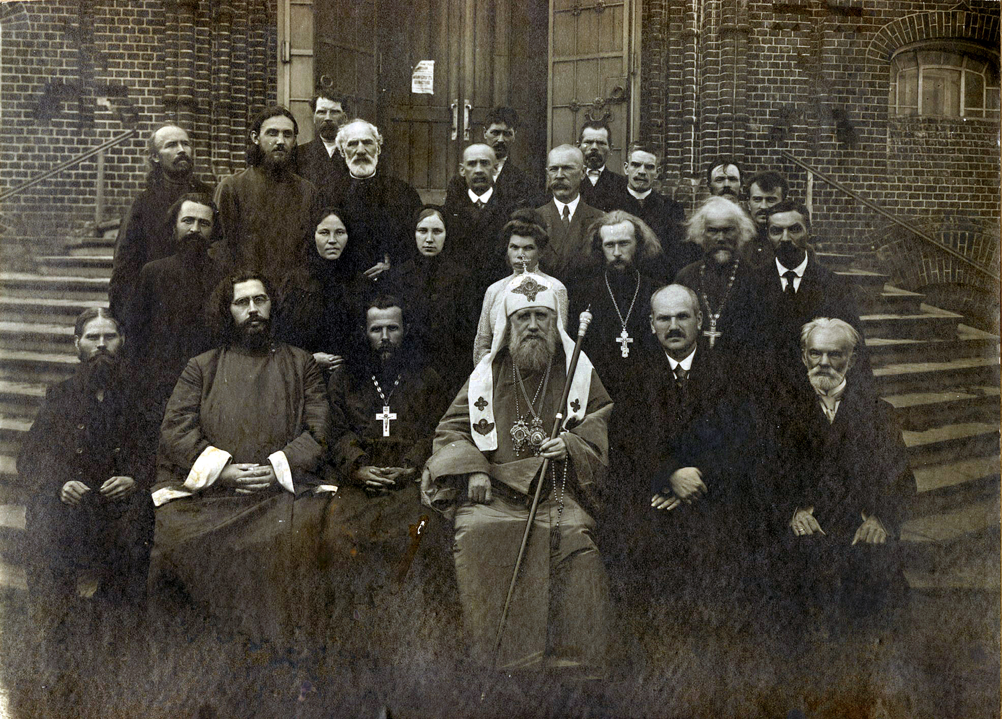 Слева от Святителя Тихона (Беллавина,19.01.1865 - 07.04.1925) - его друг, бывший председатель Комитета по сооружению храма Воскресения Христова в Сокольничьей слободе и первый настоятель этого храма о. Иоанн Кедров (07.09.1870 - 20.11.1932). Левее о. Иоанна сидит знаменитый российский бас, архидиакон (с 19.09.1921 - Великий архидиакон) Константин Васильевич Розов (22.02.1874 - 30.05.1923), голос которого сравнивали с голосом Федора Шаляпина. Именно о. Константин Розов 5 (18) ноября 1917 года провозгласил "Многая лета" Святителю Тихону в храме Христа Спасителя, когда жребий стать первым Патриархом Московским и всея Руси, после двух веков управления Российской Православной Церковью Святейшим Правительствующим Синодом, пал на митрополита Московского и Коломенского. Снимок, вероятно, сделан во время празднования 25-летия служения о. Иоанна Кедрова в духовном сане - 29 августа 1919 года. Четверть века назад Иван Иванович Кедров был возведен в сан диакона и приписан к храму в честь иконы Божией Матери "Всех скорбящих Радость" при московской городской больнице имени братьев Бахрушиных.